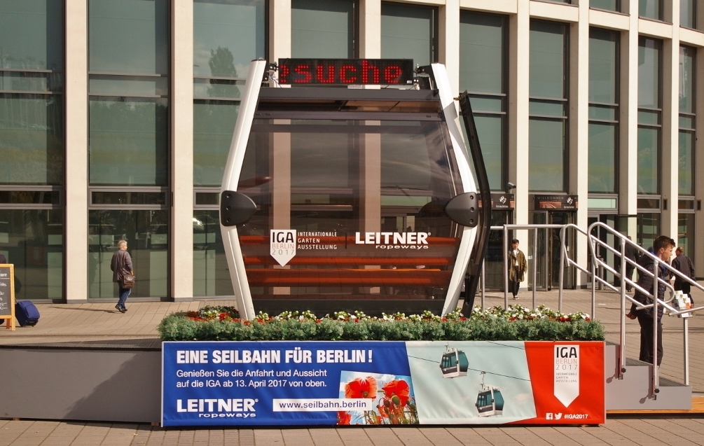 InnoTrans 2016: Für die IGA 2017 baut die Fa. Leitner ropeways aus Italien diese Kabinen vom Typ GD10, in der bis zu 10 Personen Ülatz haben. Die Kabienenbahn ist kuppelbar und wird am 13. April 2017 in Berlin ihren Betrieb aufnehmen.